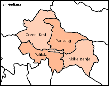 Niš municipalities, Serbia/Municipalités formant la Ville de Niš, Serbie